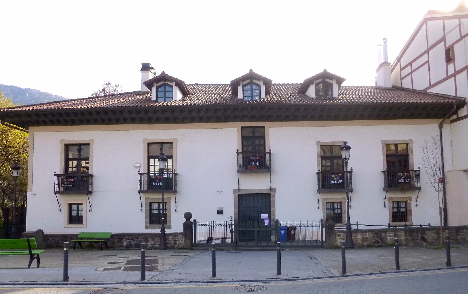 Gaztañadui jauregia (Eskoriatza, Gipuzkoa)